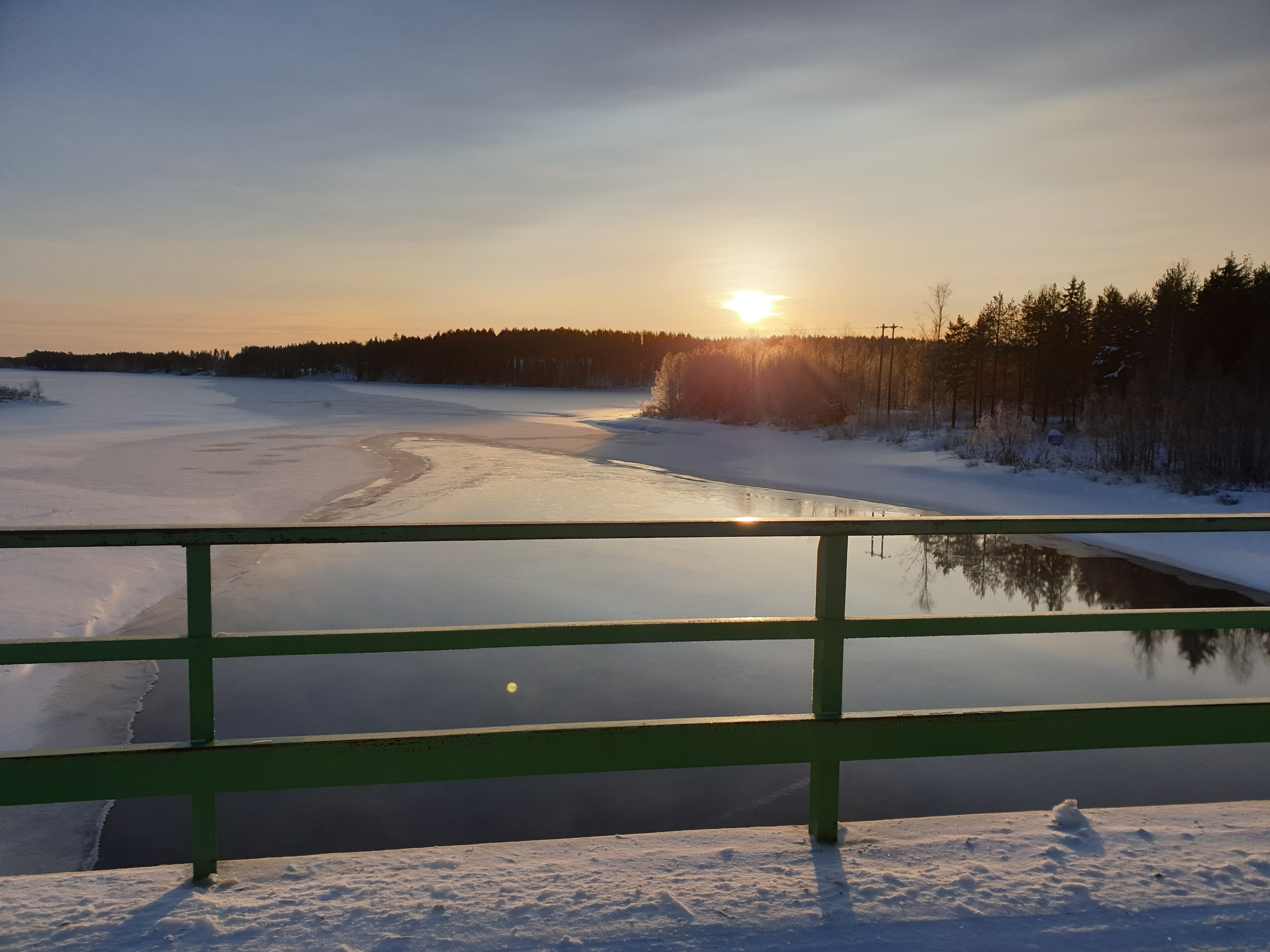 Vinter vid Storsundsbron Lansjärv